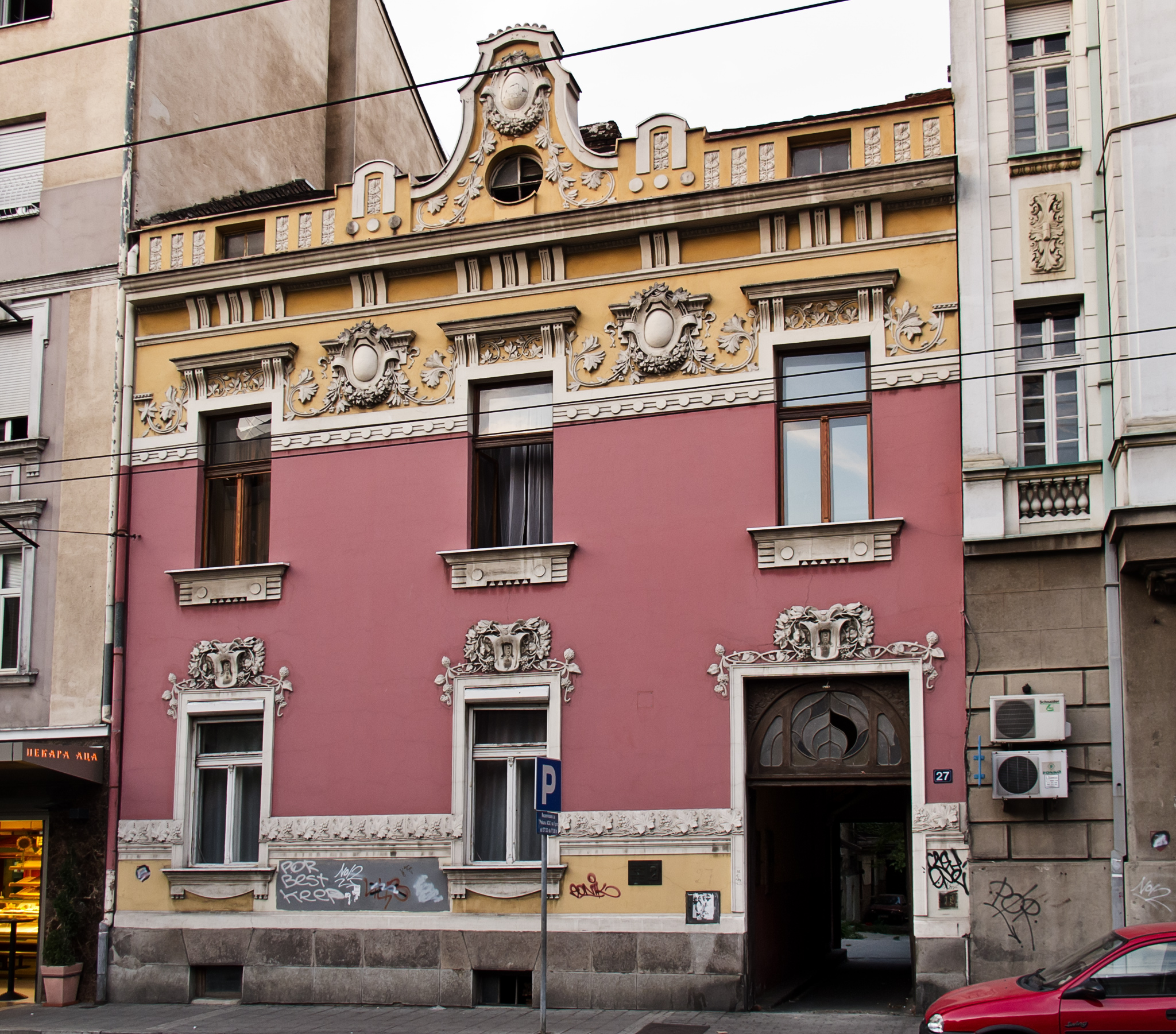 Атеље Уроша Предића, Светогорска 27, Стари град, Београд, Србија